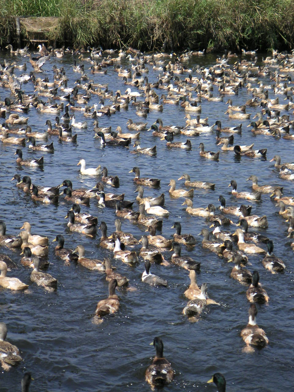 Kerala Backwaters. Ducks.